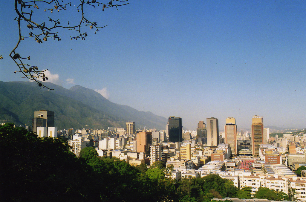 Caracas from El Calvario.